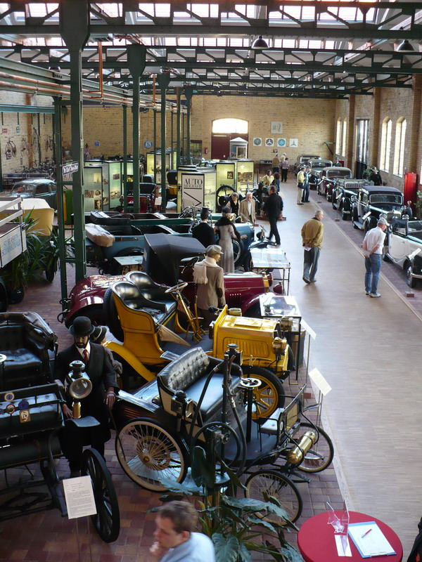 Automuseum Dr. Carl Benz innen in Ladenburg